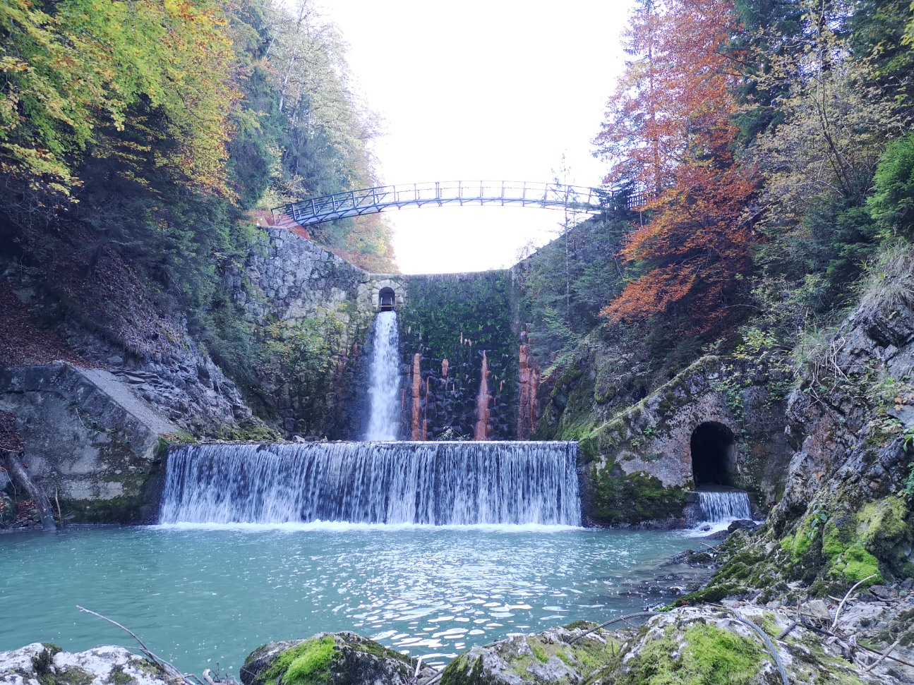 Le Barrage de Pierra Bessa au coeur de la forêt ivre